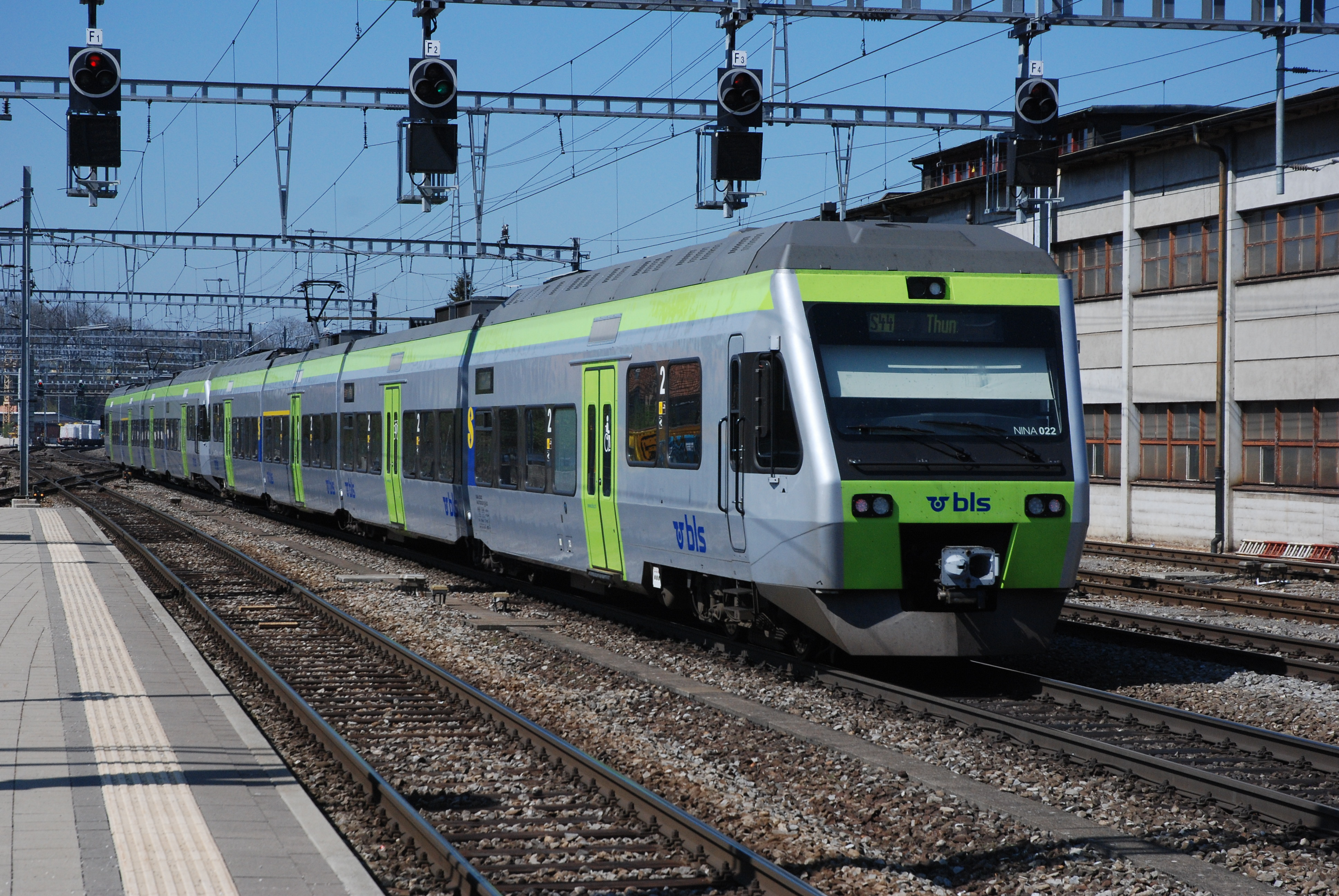 BLS RABe 525 022 + 020